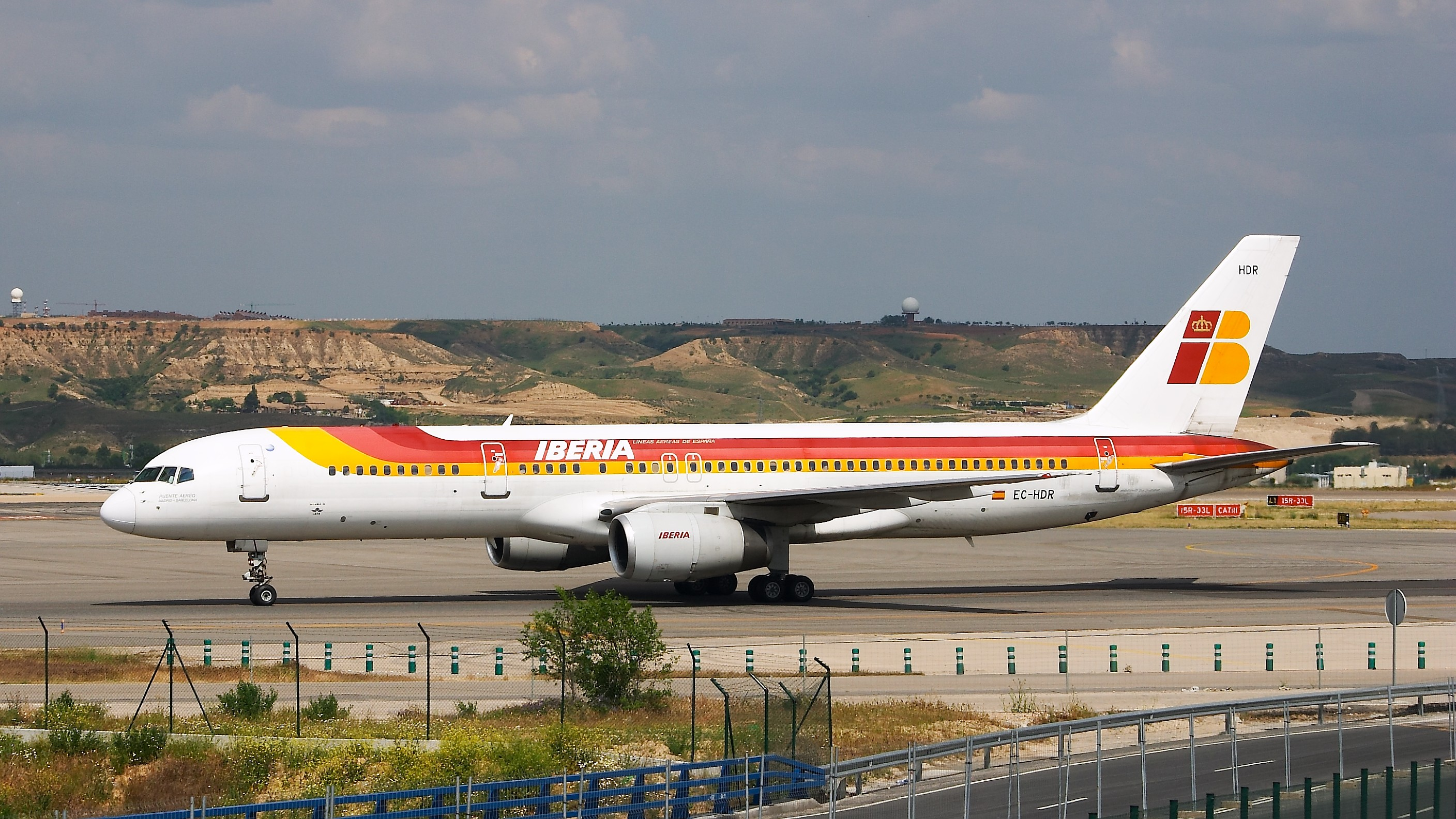 Boeing 757-256 de Iberia dirigiéndose a la T4 del aeropuerto de Madrid Barajas.